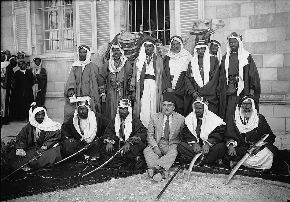 השייכים של שבט תראבין. בינהם מושל נפת באר שבע, עארף אל-עארף